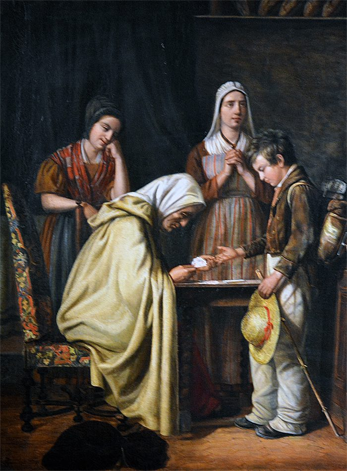 Wahrsgerin